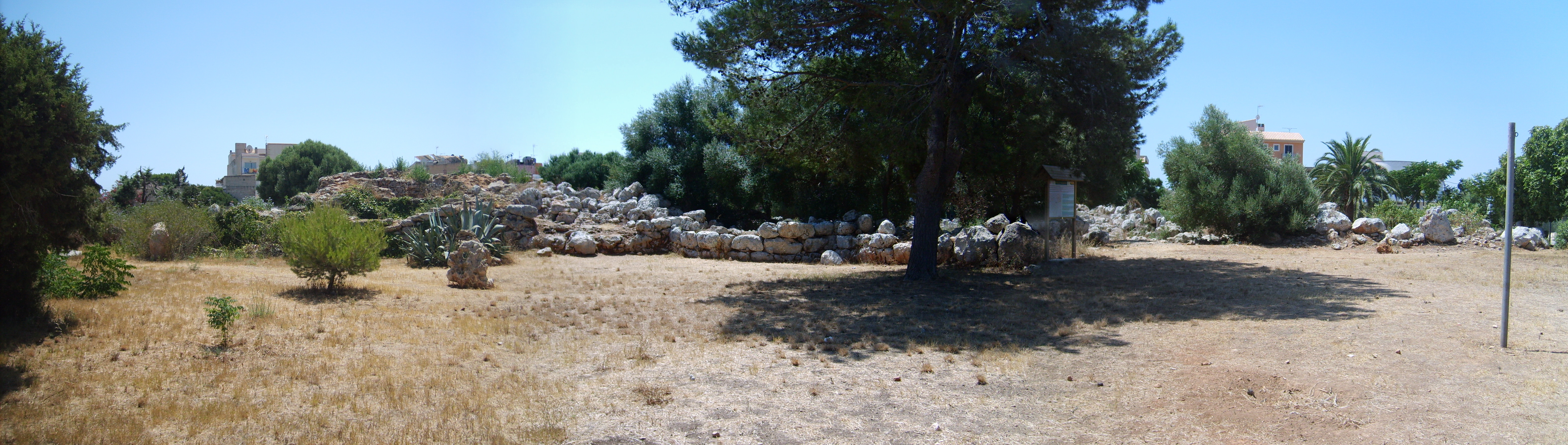 Panoramabild vom Talayotischen Dorf in S´illot auf Mallorca